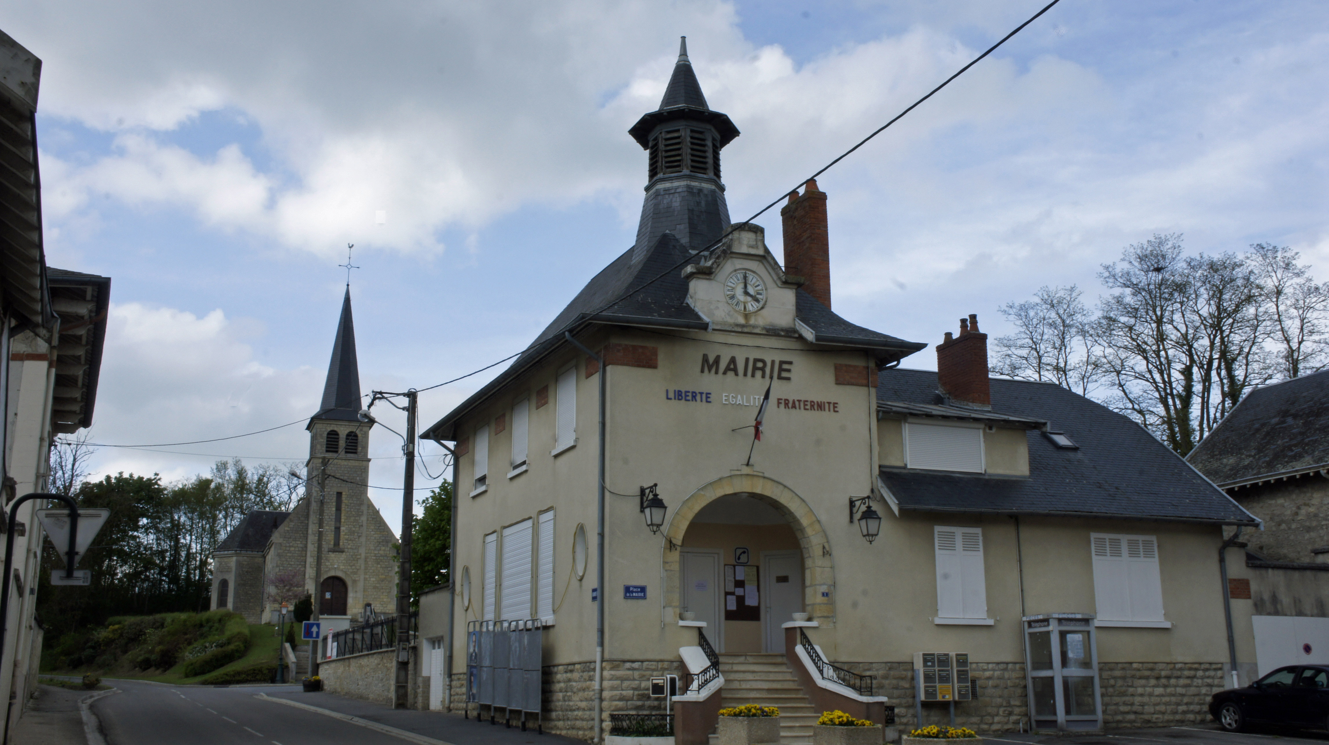 Vue de la Mairie, de l' église et du monument aux morts de Thil.